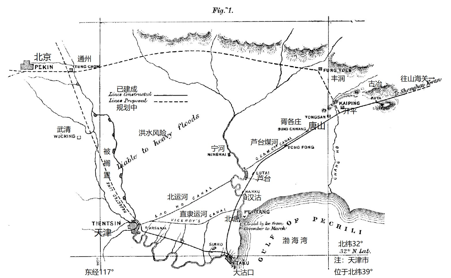 金达提供的铁路计划，截止至1891年。图中可以看见已经完工的芦台煤河、古冶-大沽口-天津铁路线和规划中的津通铁路（被搁置）和通州-丰润铁路。